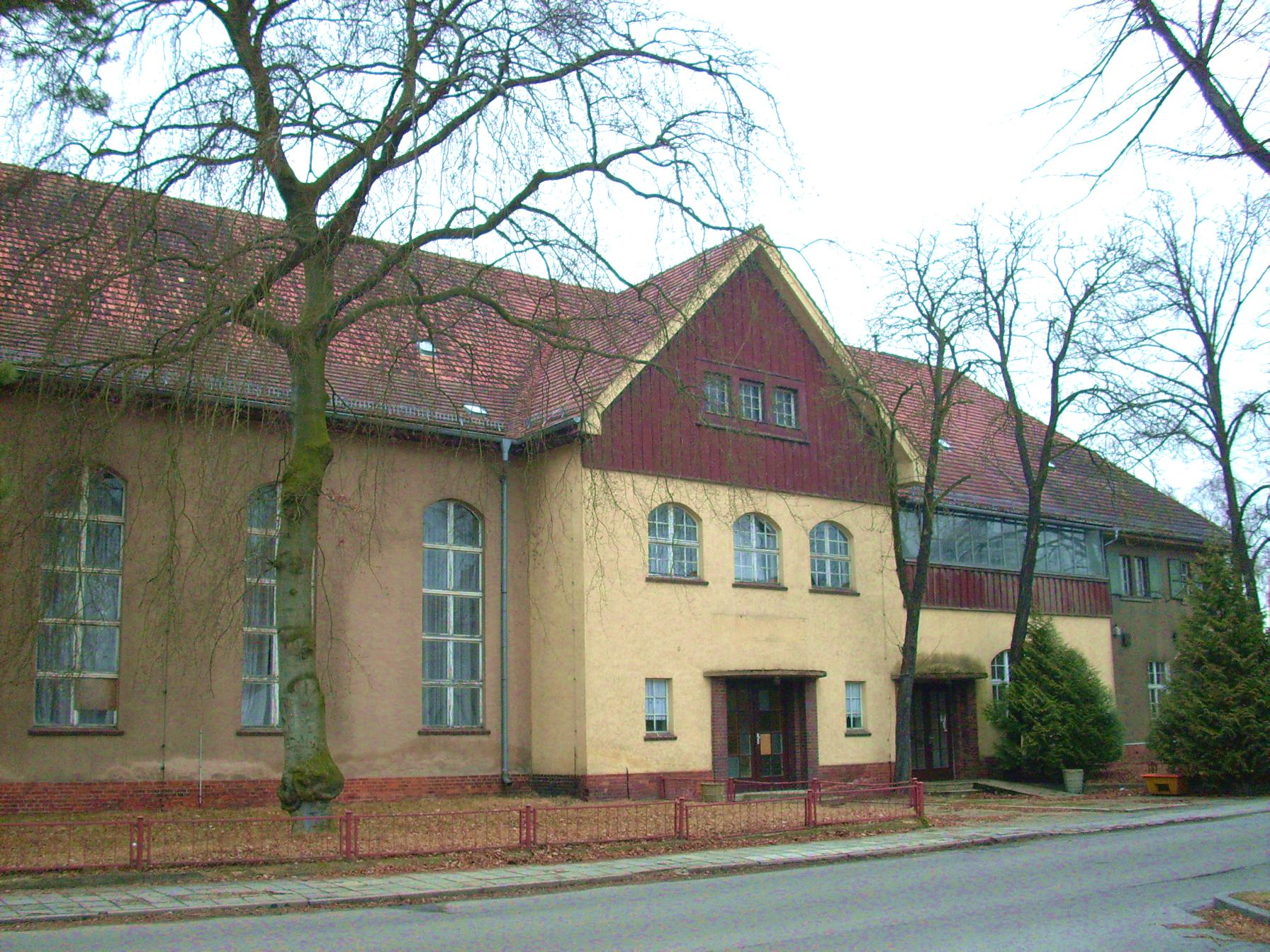 Gaststätte und Kulturhaus, Ernst-Thälmann-Straße 5 in Knappenrode, Ortsteil von Hoyerswerda